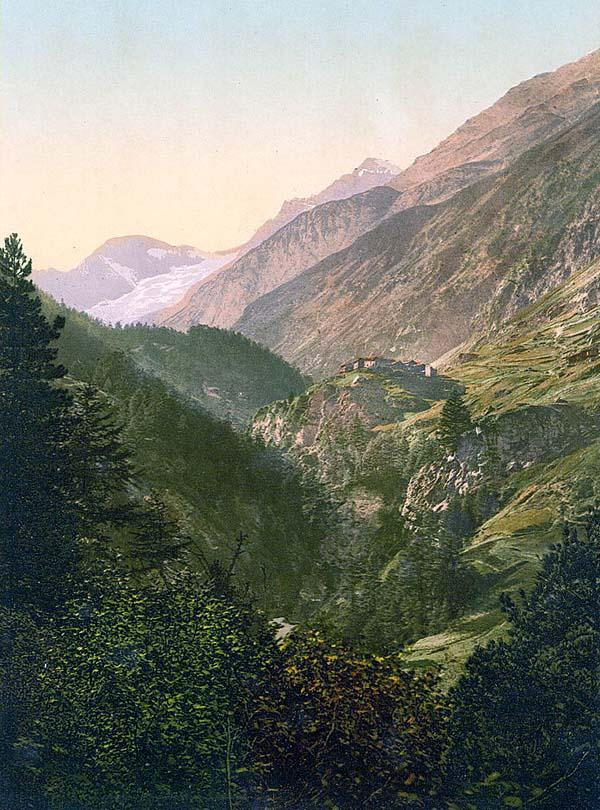 Zmuttal, Zmuttgletscher, 1890er Photochrom Postkarte